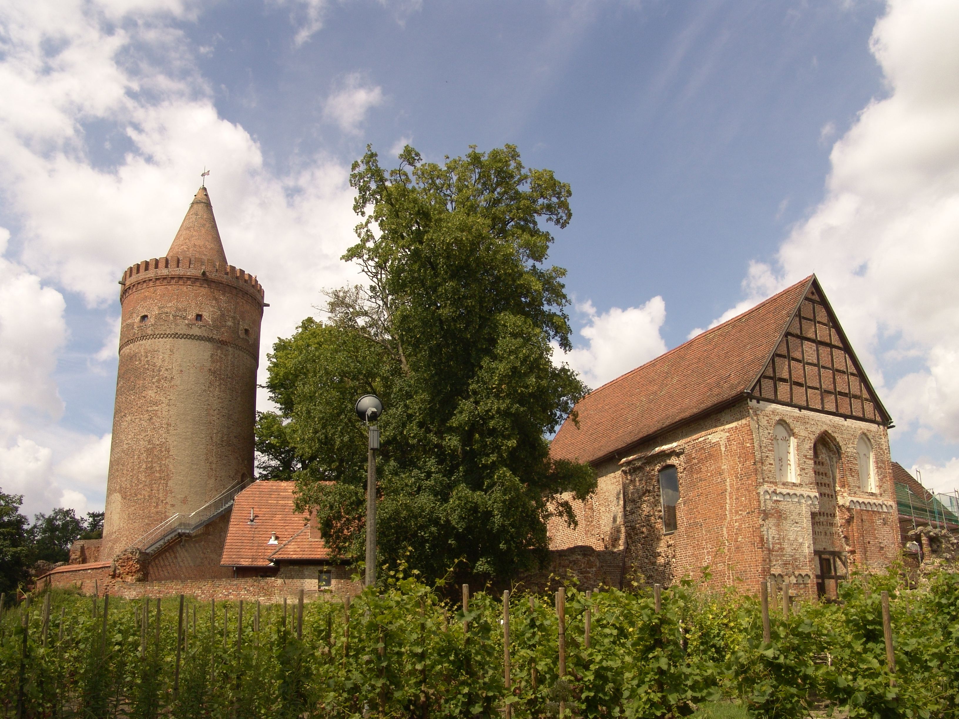 Burg Strargard